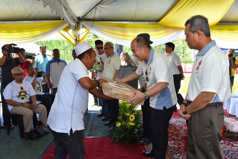 YTM Tengku Mahkota Kelantan selaku Yang Dipertua MAIK mengampuni perkenan untuk mengurniakan sumbangan kepada asnaf melalui program Mesra MAIK